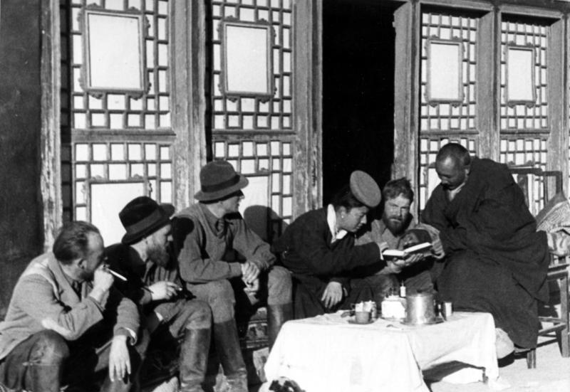 Lhasa, wir werden von Regierungsmitgliedern besucht